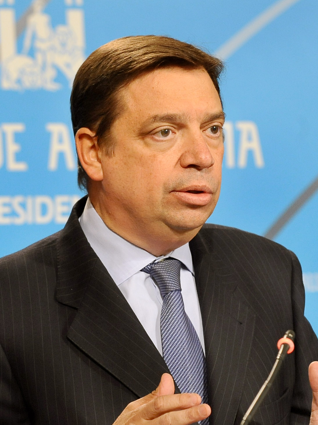 El consejero de Agricultura y Medio Ambiente de la Junta de Andalucía